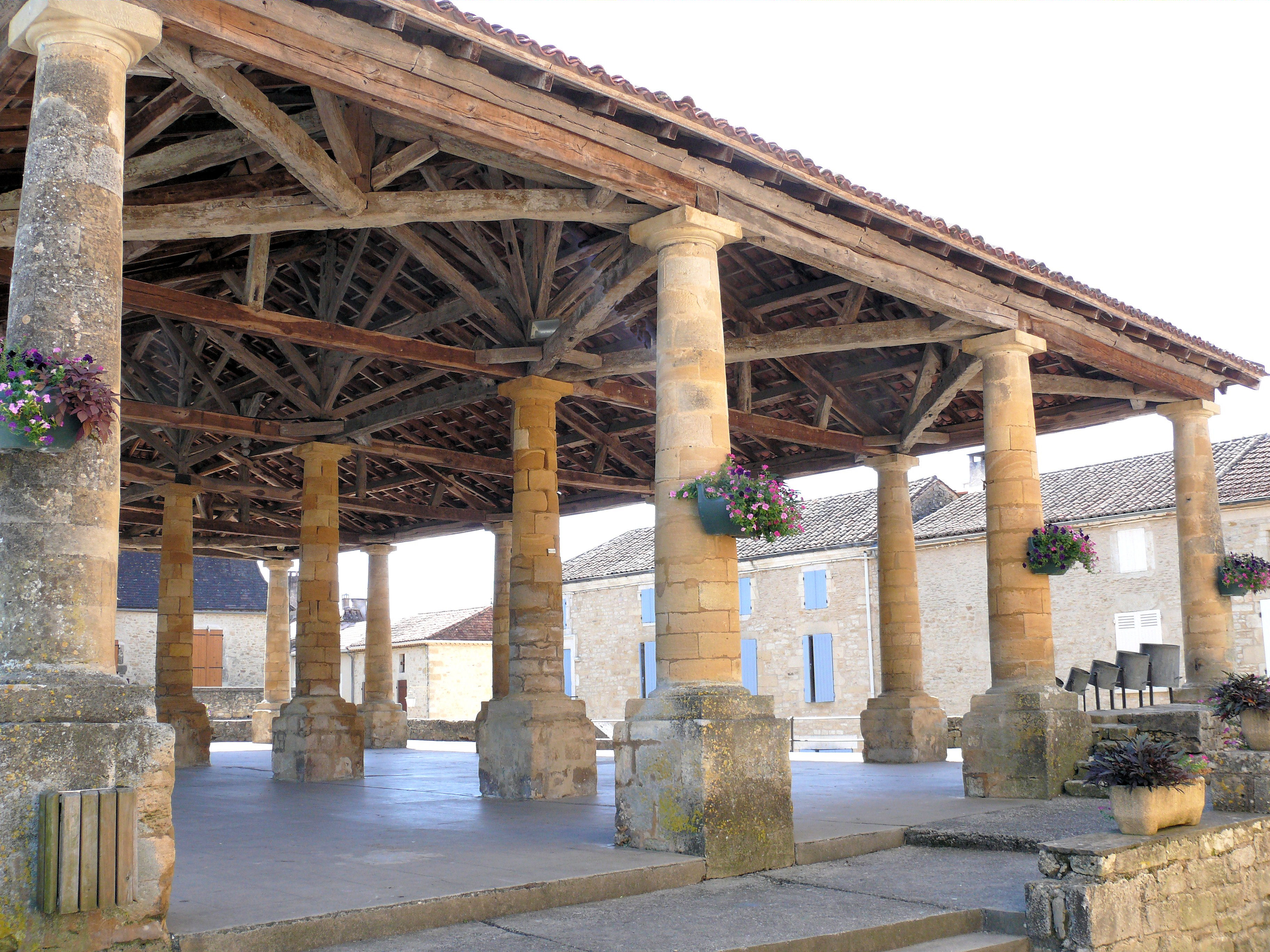 Villefranche-du-Périgord - Halles